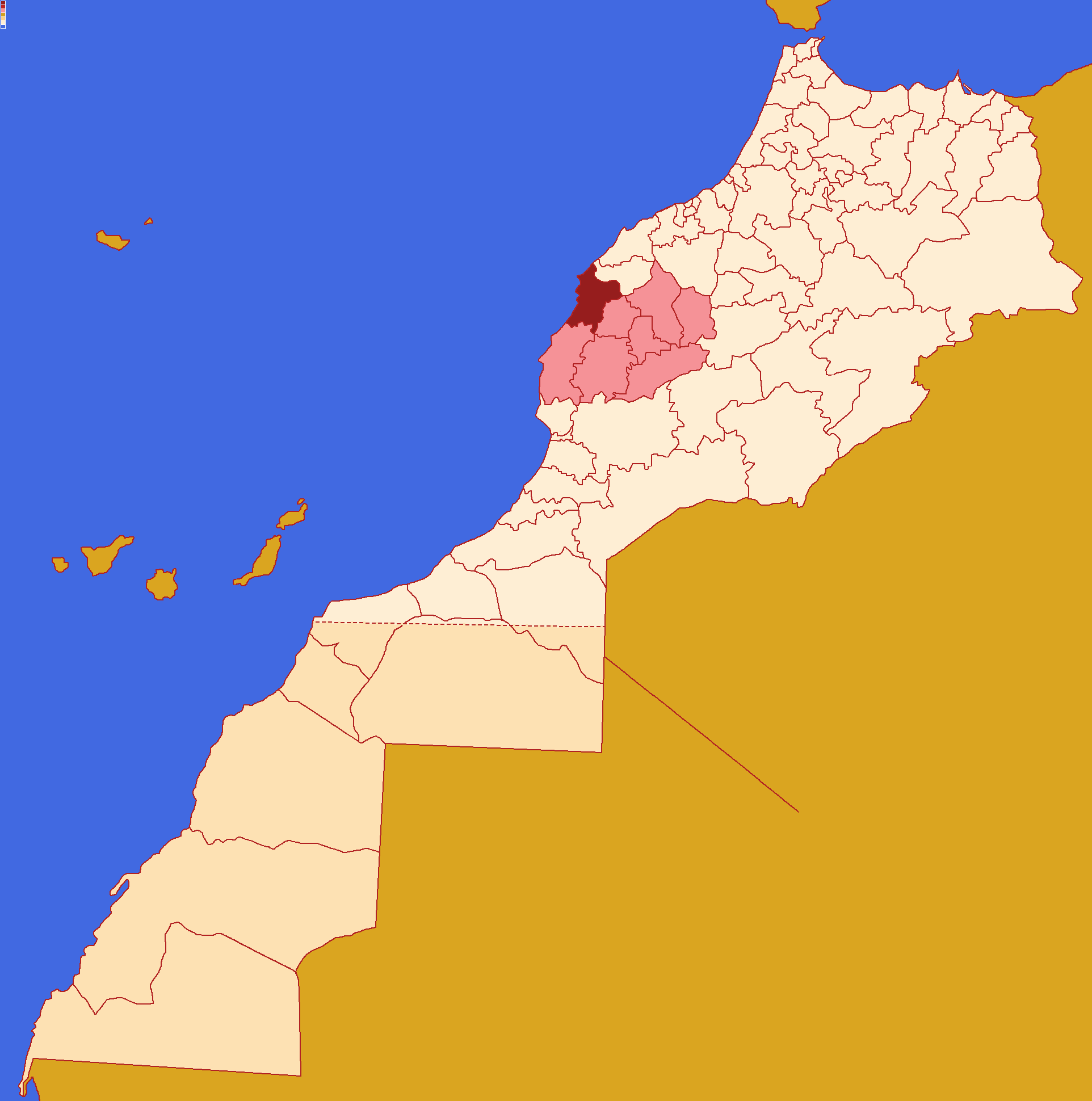 Localização da província de Safim ,dentro da região de Marraquexe-Safim e dentro de Marrocos. Conforme a reforma administrativa de 2015.